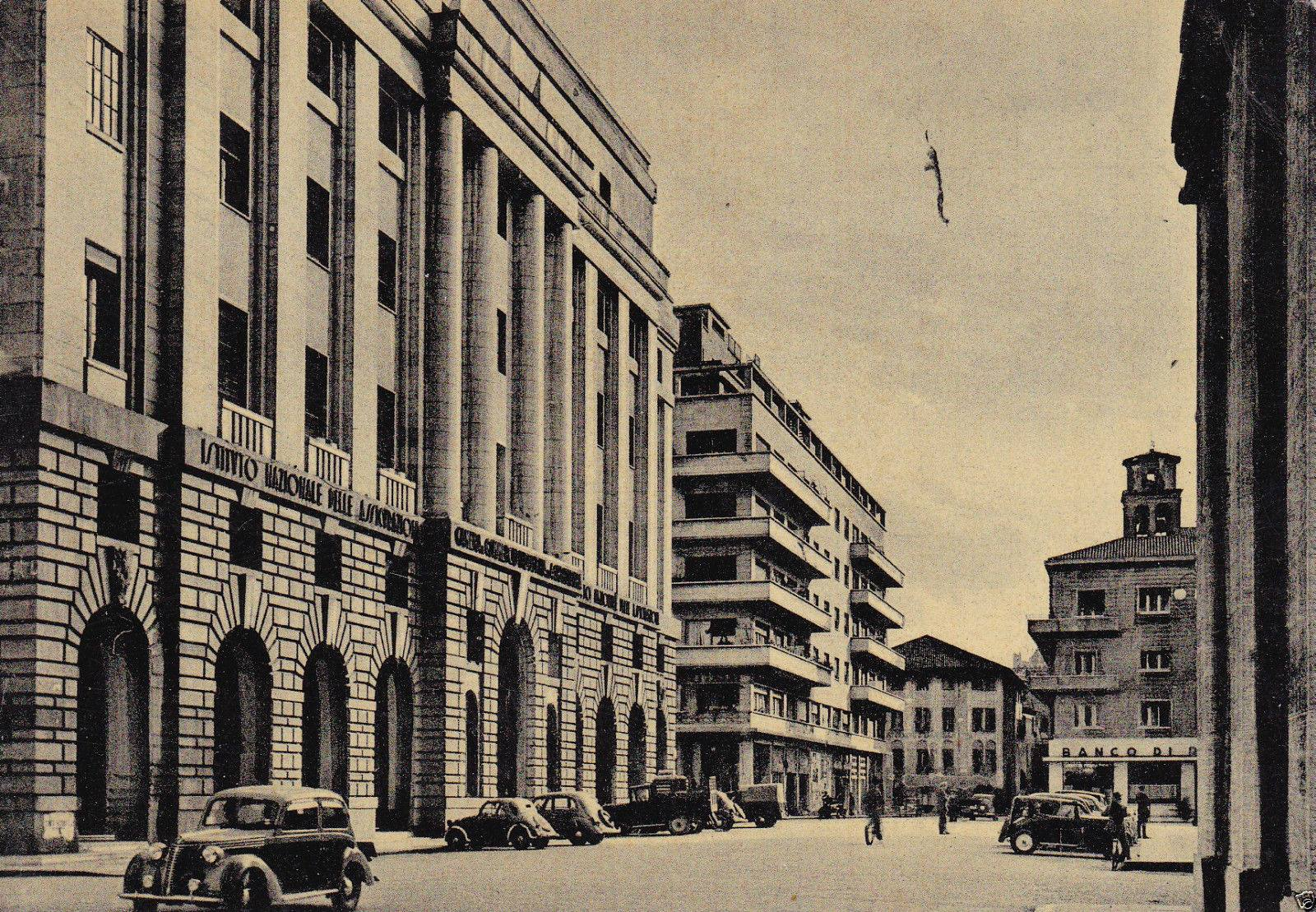 Panoramica dell'edificio della Camera di Commercio di Padova, sito in piazza dell'Insurrezione. Foto risalente agli anni 1950-60